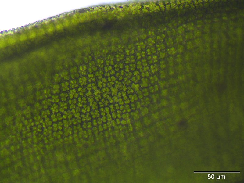 Mauer-Drehzahnmoos (Tortula muralis), Laminazellen, Vergrößerung: 400x